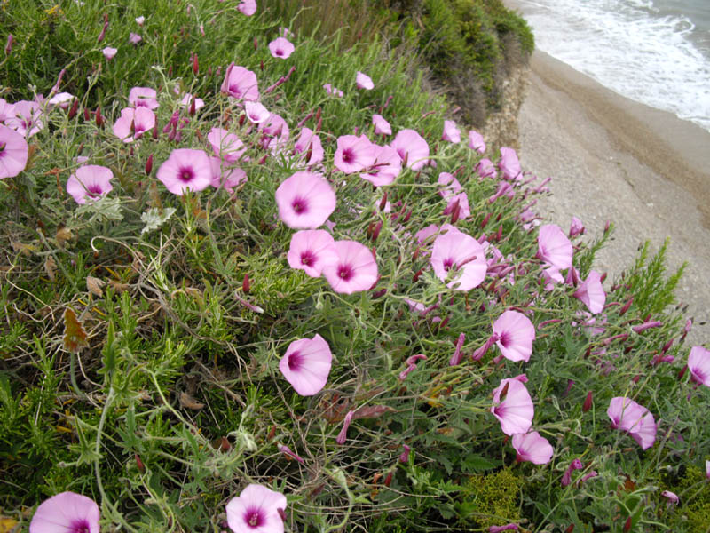 Convolvulus althaeoides